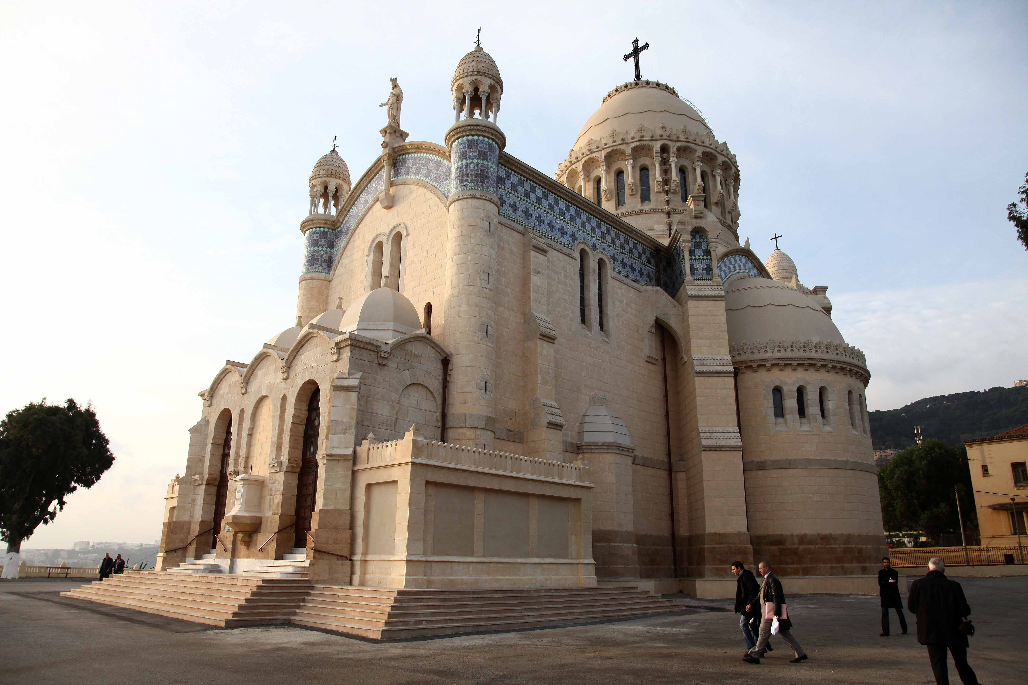 كاتدرائية نوتر دام بالجزائ 2010